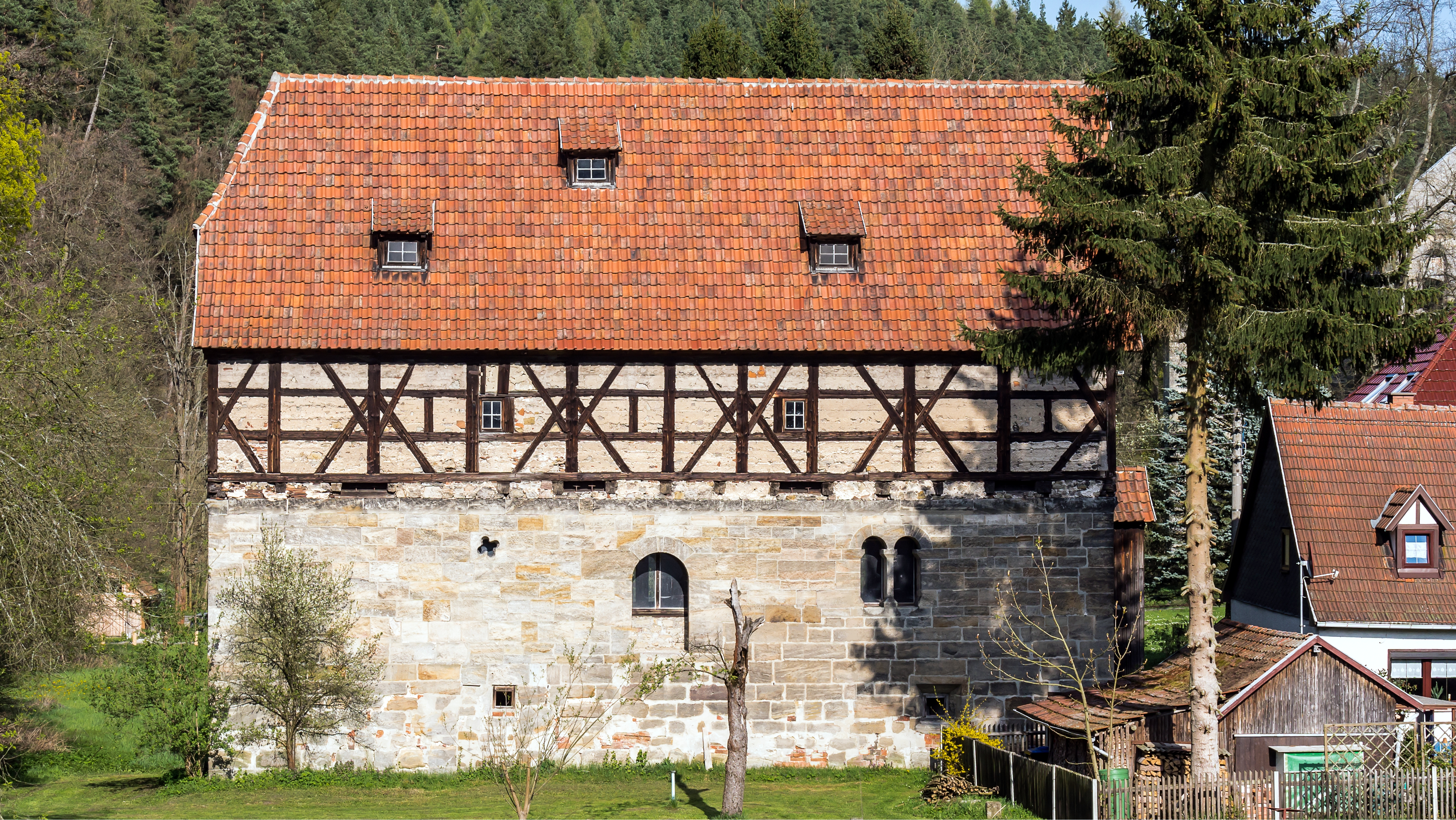 Zinsboden des ehemaligen Klosters Paulinzella in Thüringen